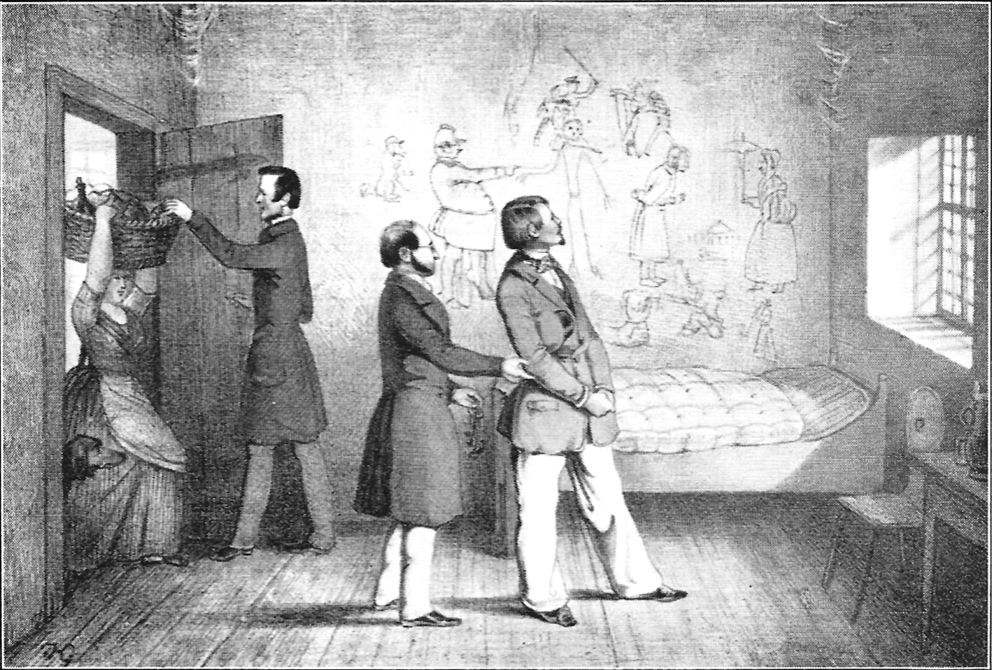 Karzer im Dachstock der alten Aula (Zeichnung). Links, an der Tür ist der Pedell Saifer, in der Bildmitte der Pedell Payer abgebildet. An der Wand ist die Zeichnung des Polizisten Mayer zu sehen.